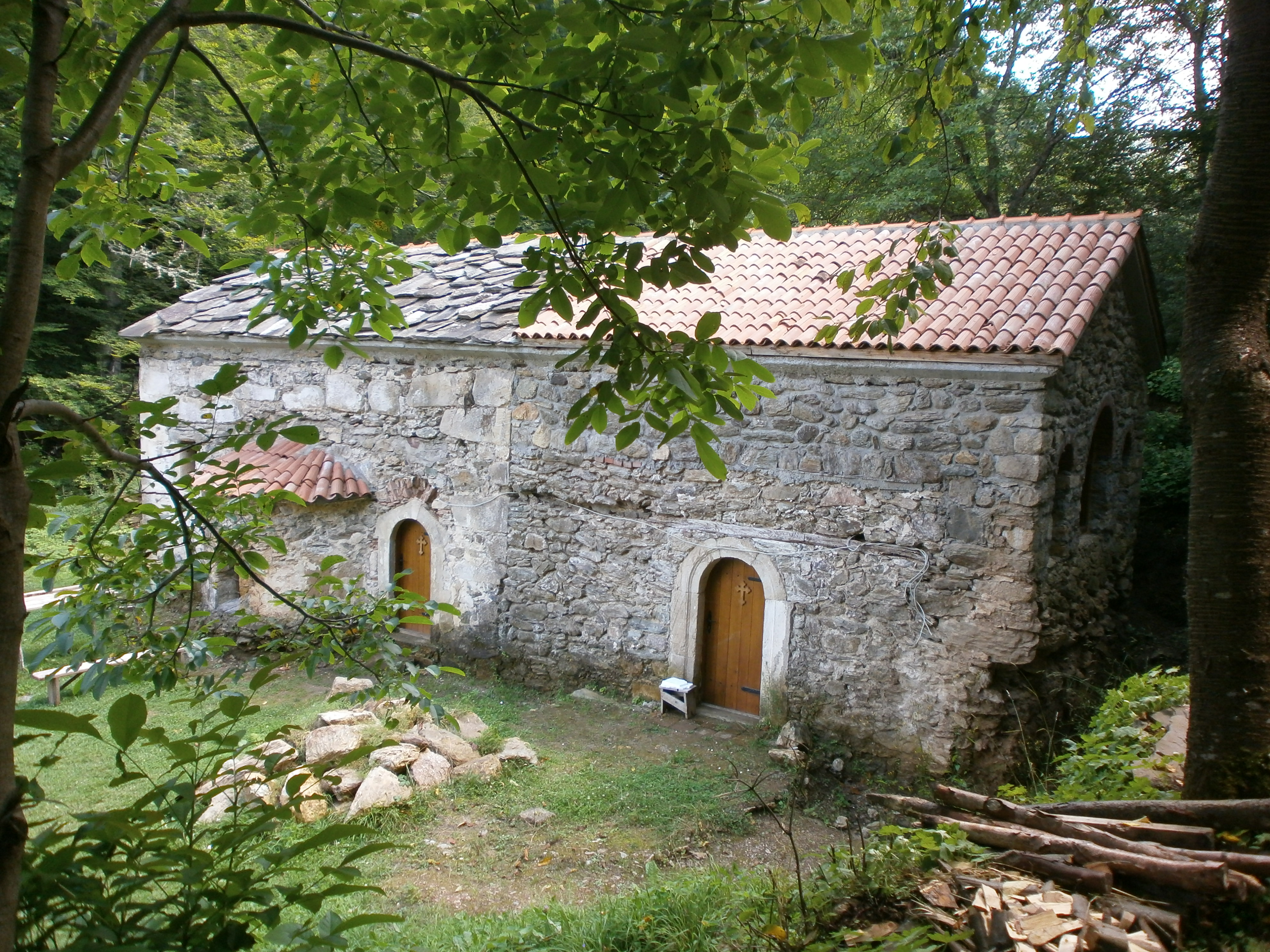 Manastir koji se nalazi u selu Palja